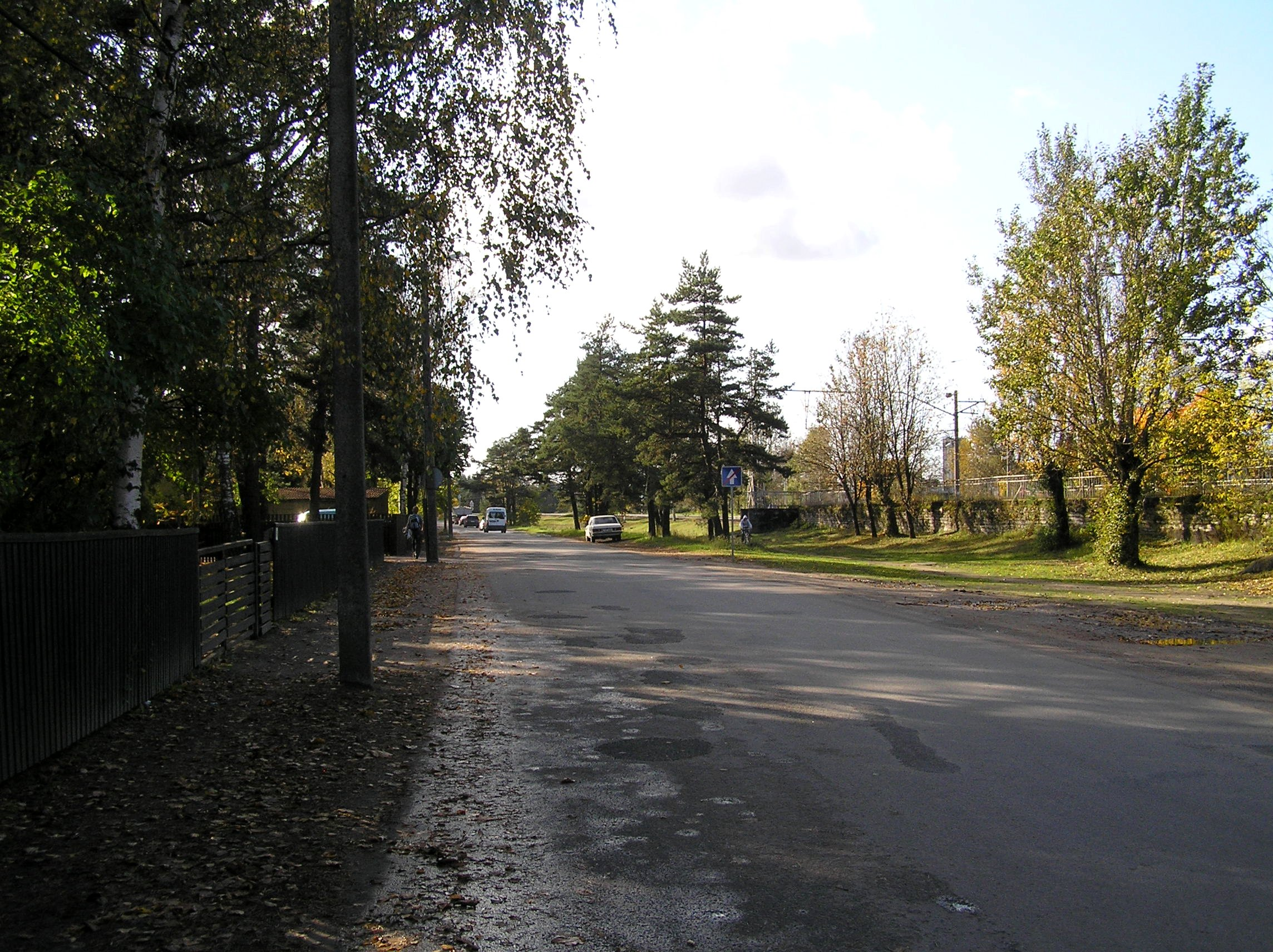 Vaade Hiiu jaama juurest Pääsküla suunas